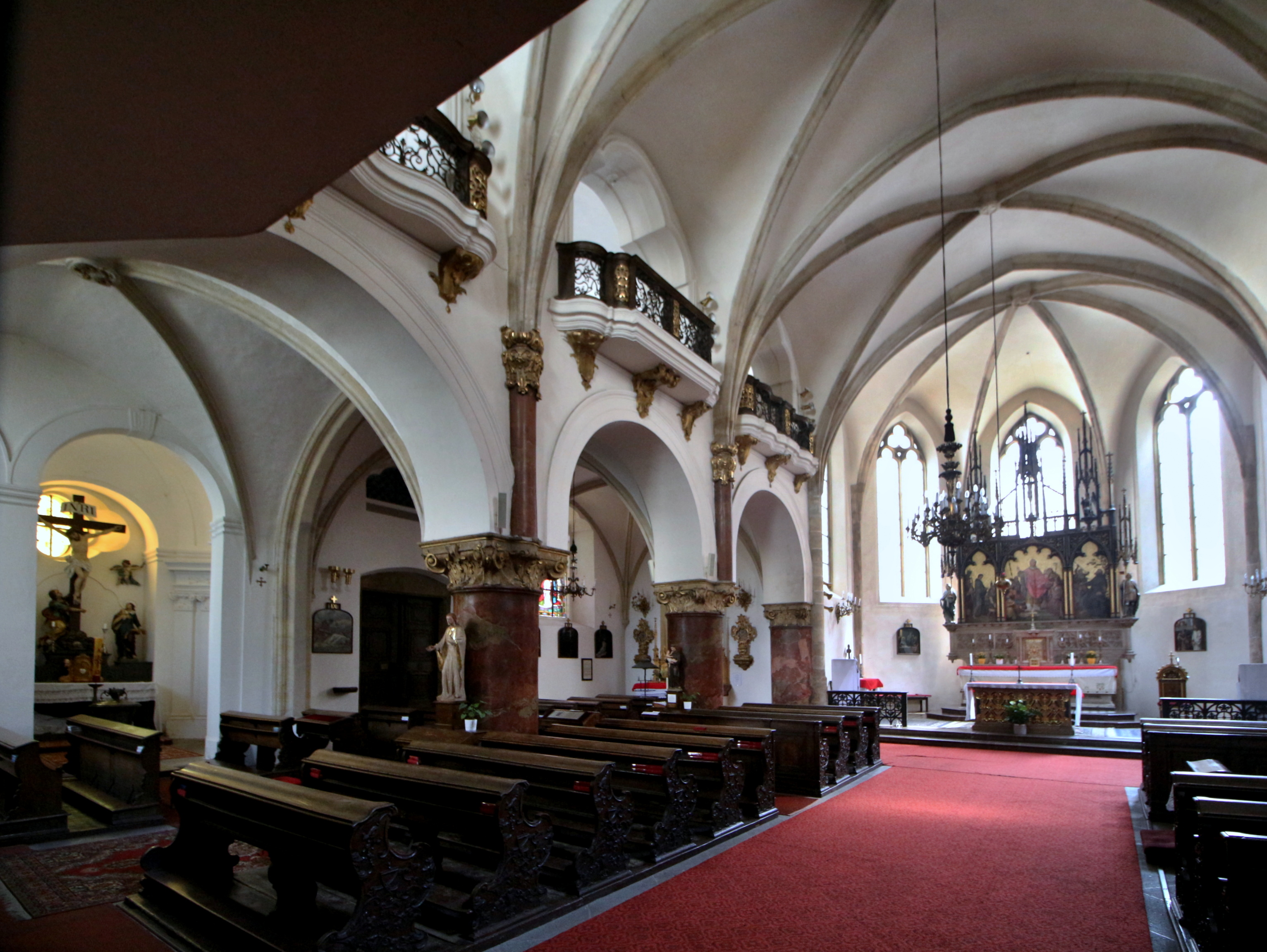 Kostel sv. Vojtěcha, Praha-Nové Město